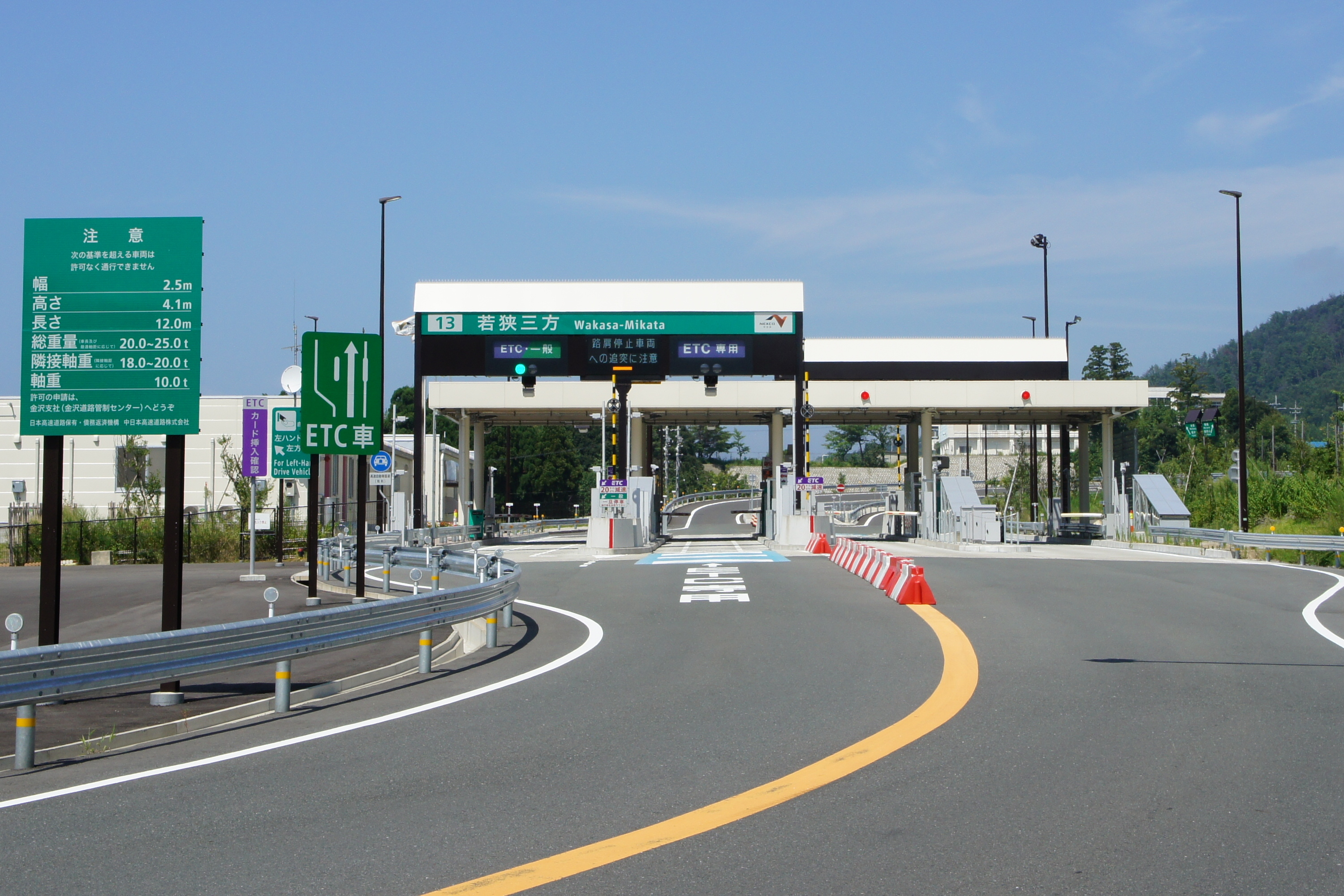 若狭三方インターチェンジ, 福井県三方上中郡若狭町